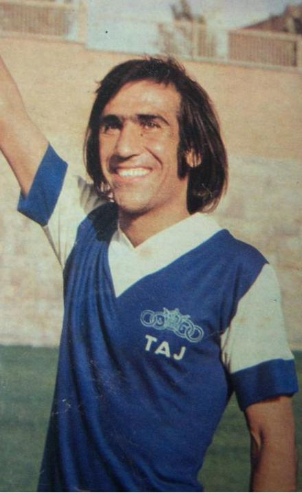 تصویر قدیمی از علی جباری، بازیکن سابق باشگاه فوتبال استقلال